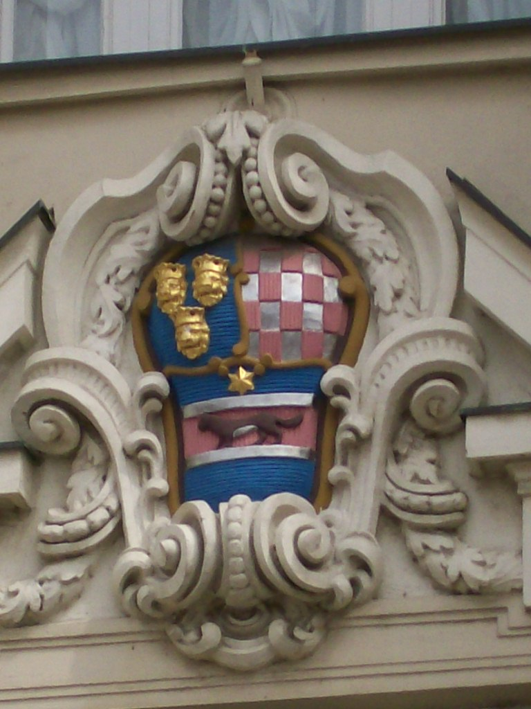 Povijesni grb Hrvatske na zgradi Hrvatskog sabora (Historical CoA on Croatian Parliament building)